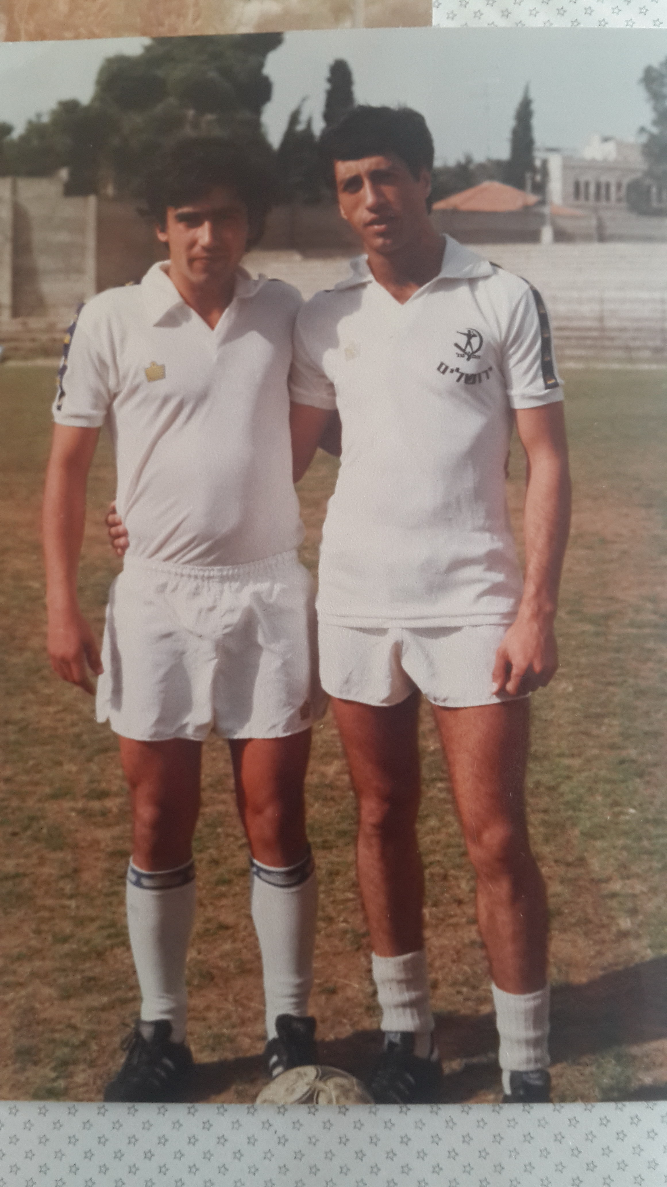 ציון מרילי ואברהם בן דוד